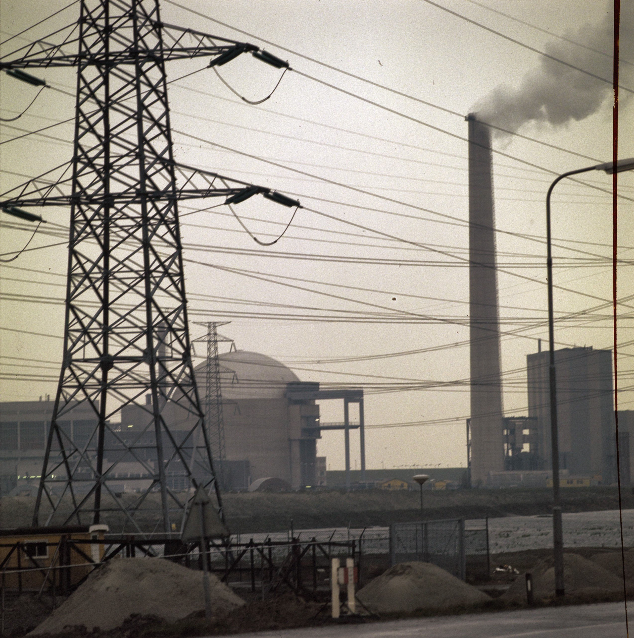 Collectie / Archief : Fotocollectie Anefo Reportage / Serie : [ onbekend ] Beschrijving : Kerncentrale Borssele; exterieurs Datum : 1974 Locatie : Borssele Trefwoorden : kerncentrales Fotograaf : Mieremet, Rob / Anefo Auteursrechthebbende : Nationaal Archief Materiaalsoort : Dia (kleur) Nummer archiefinventaris : bekijk toegang 2.24.01.07 Bestanddeelnummer : 254-9451